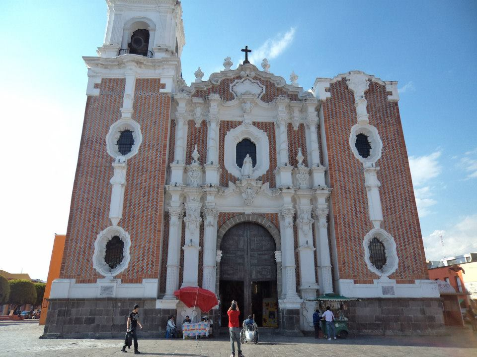 La parroquia de San Jose se encuentra en pleno centro histórico y colonial de la ciudad de Tlaxcala.